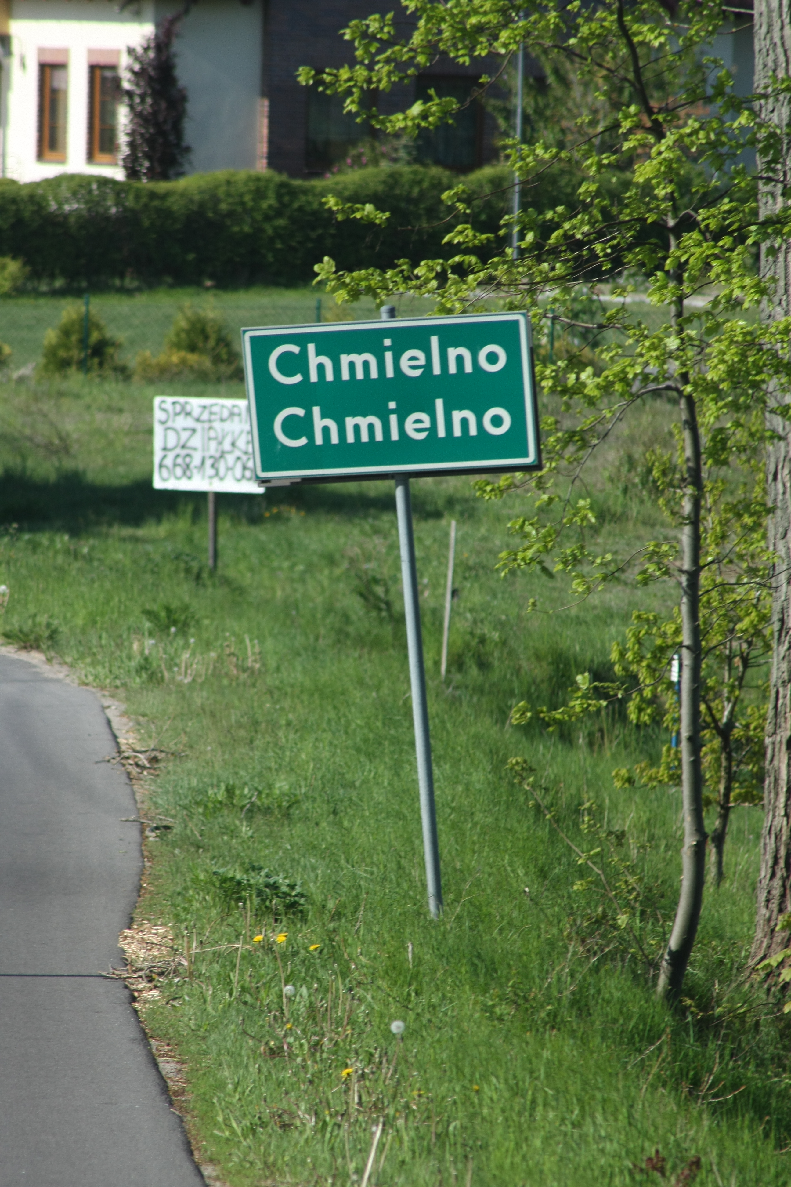 Dwujęzyczna tablica z nazwą przed wjazdem do wsi Chmielno